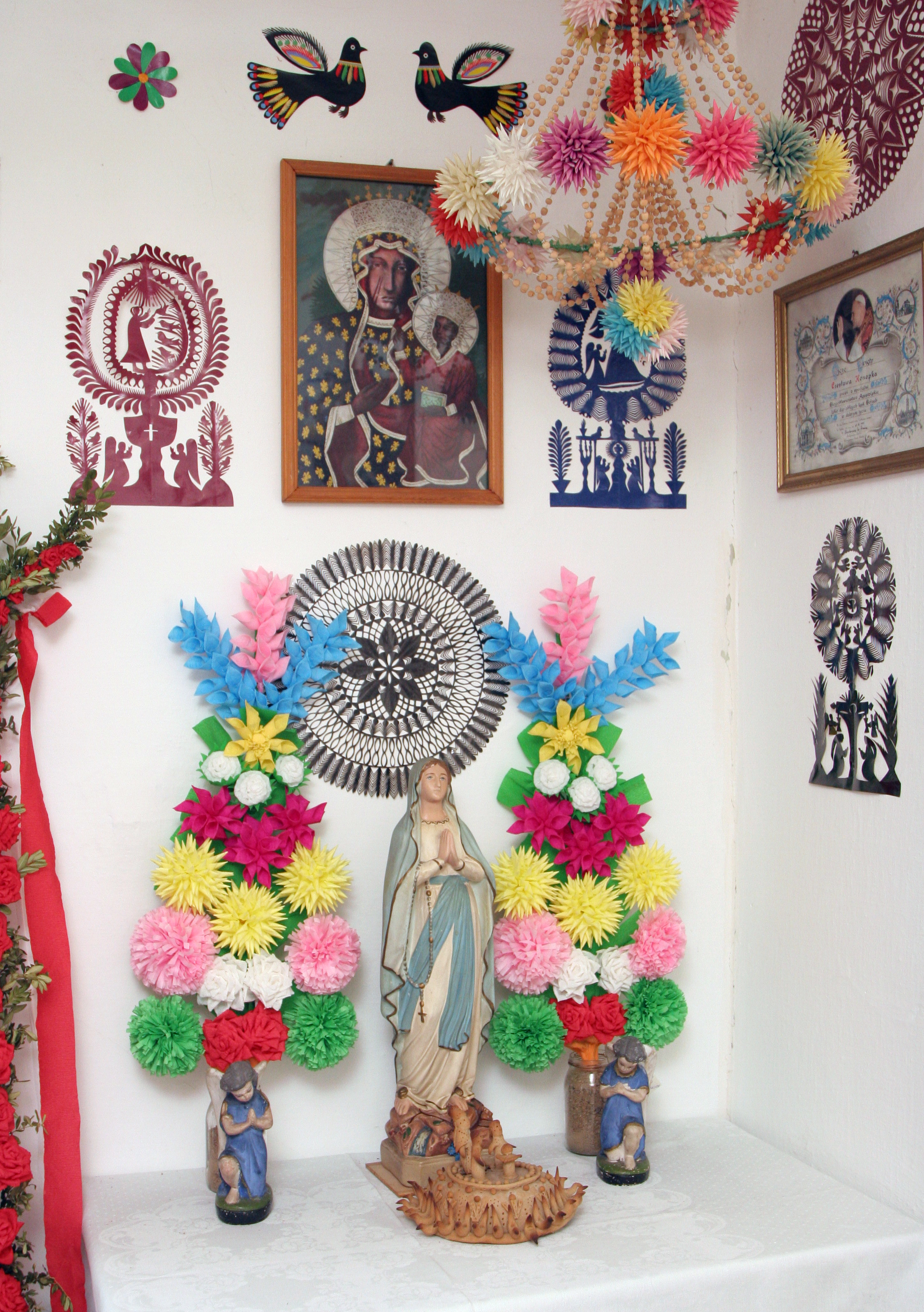 Chata kurpiowska - ołtarzyk